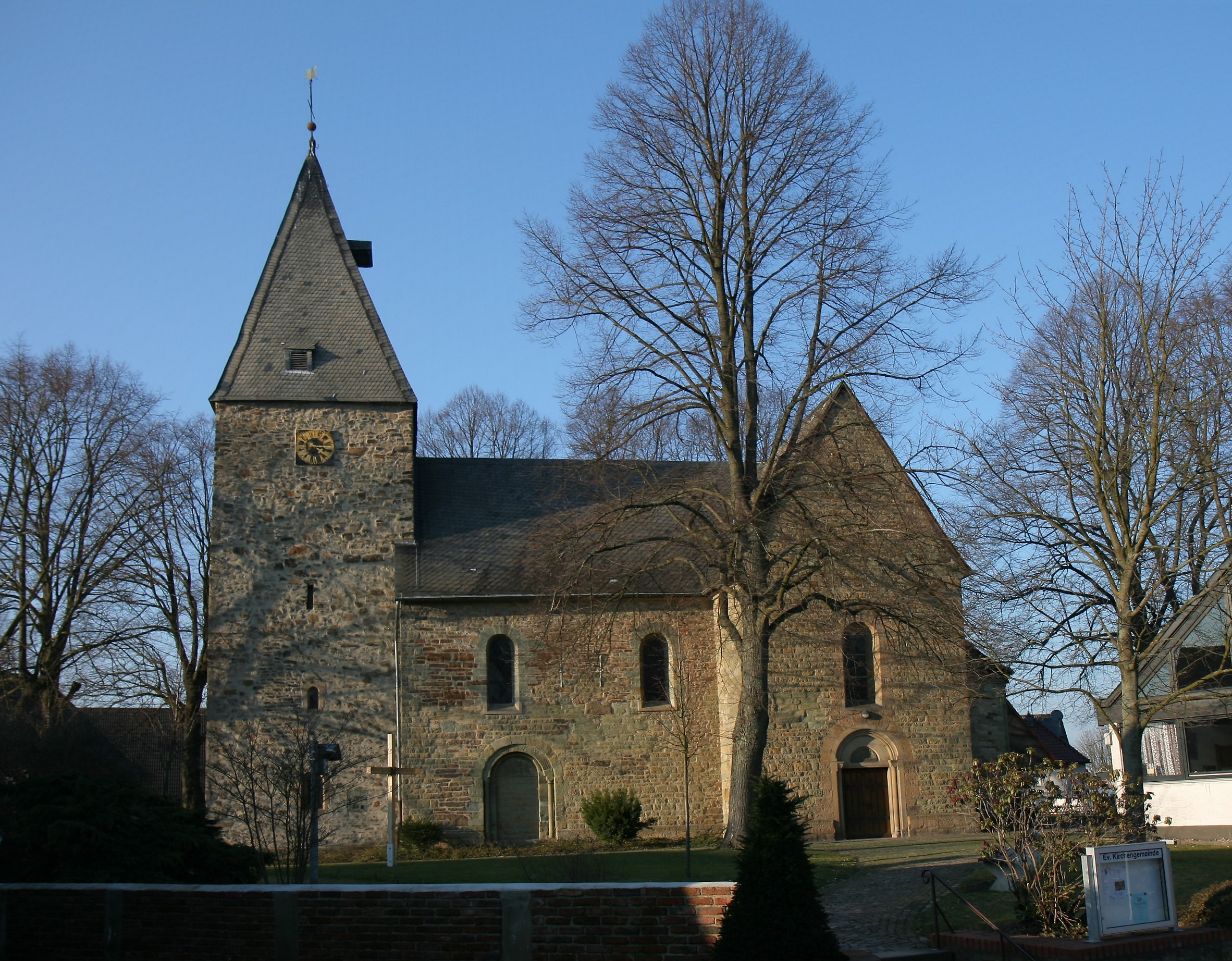 Evangelische Johanneskirche in Iserlohn-Hennen. Kreuzförmige romanische Saalkirche aus Bruchstein, errichtet um 1200.